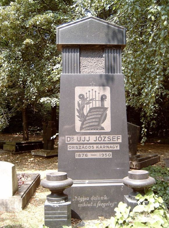 Ujj József (1876-1950) karnagy, kórusvezető sírja Budapesten. Sírfelirata: „Zúgjon dalunk miként a fergeteg!" Kerepesi temető: 34/2-1-40